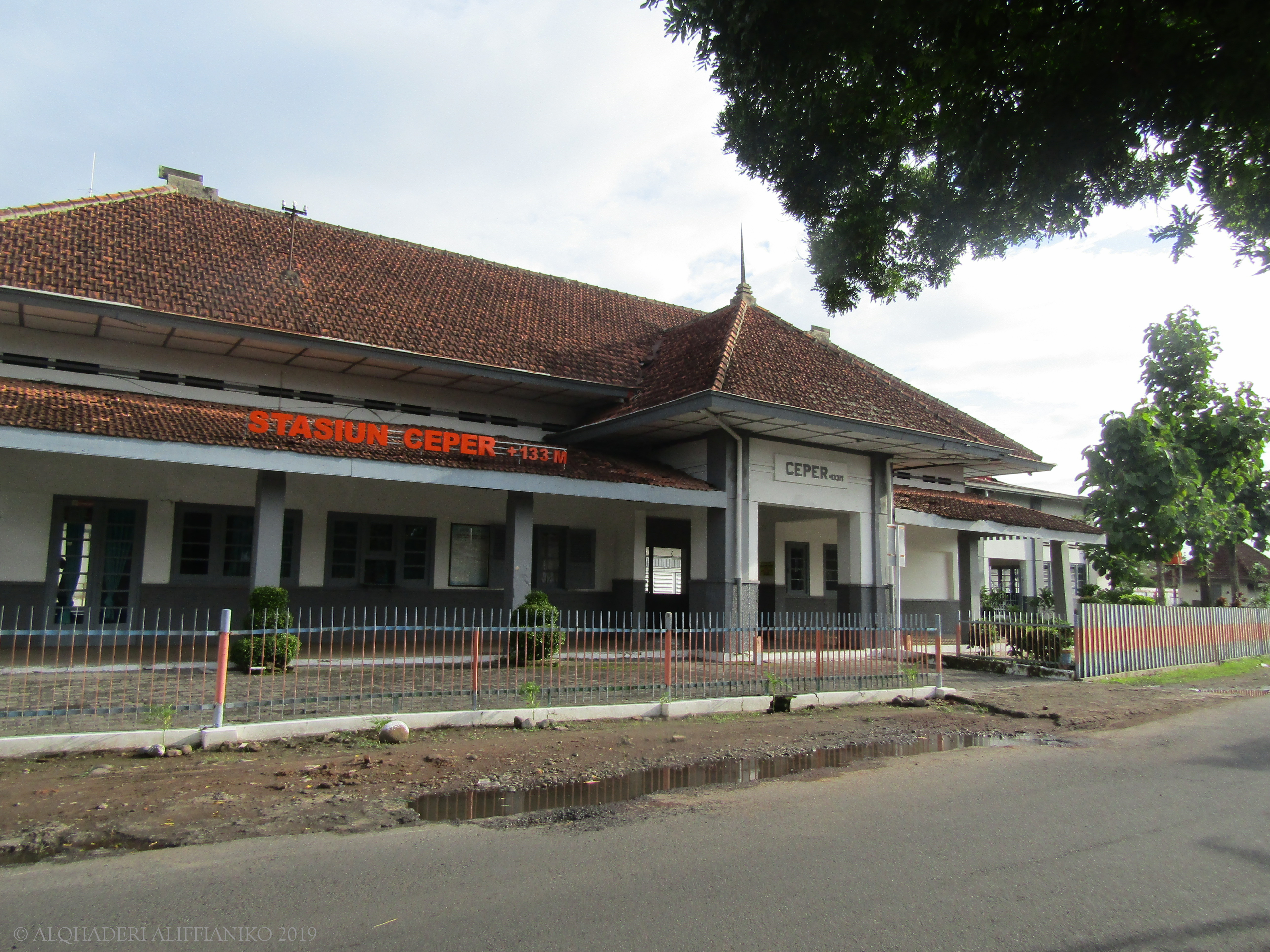 Tampak depan Stasiun Ceper, 2019